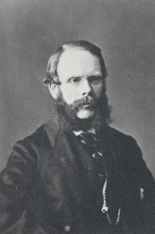 Portrait of Benjamin Herschel Babbage.